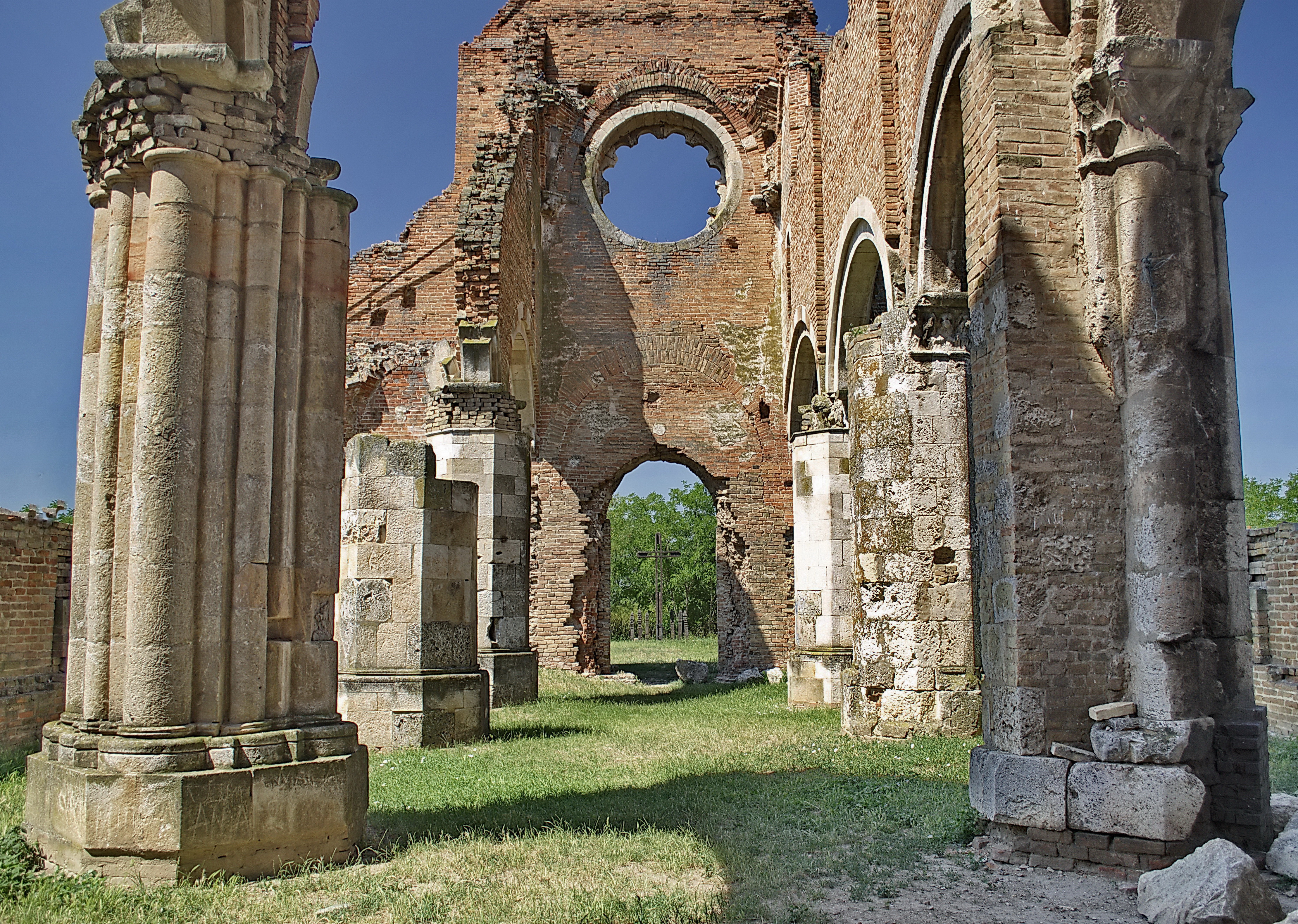 Рушевине старог Бенедиктанског манастира из 12. века, у близини Новог Бечеја.